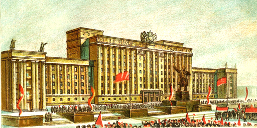 Изображение проекта Ленинградского Дома Советов (арх. Н.А.Троцкий, М.А.Шепилевский, Я.Н.Лукин). Автор литографии В.(М.)Максимов (1939). Это по всей вероятности художник-архитектор В.А.Максимов (1892 - 1942?), погибший в Ленинграде в дни блокады.[1], стр.36. Инициалы арх. В.Максимова, по всей вероятности указаны умышленно неправильно, т.к. его отец арх. А.А.Максимов (1876 -1936) в это время находился в заключении.